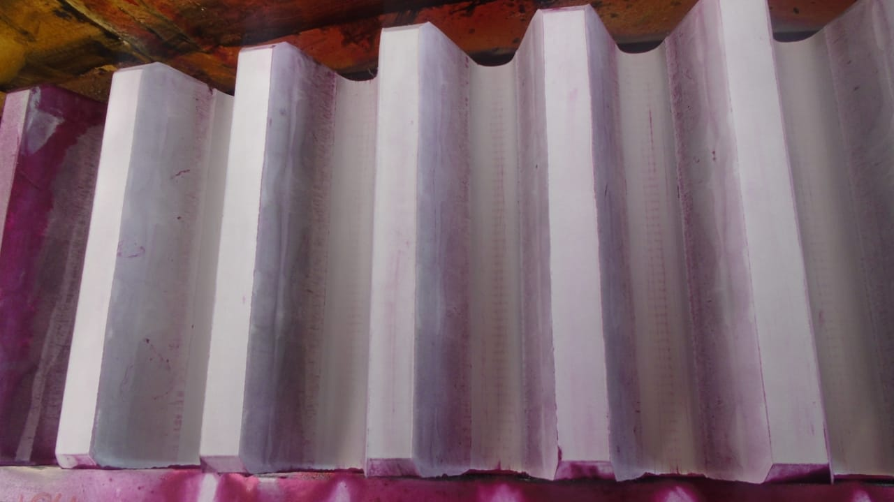 Una imagen del ensayo de líquidos penetrantes.